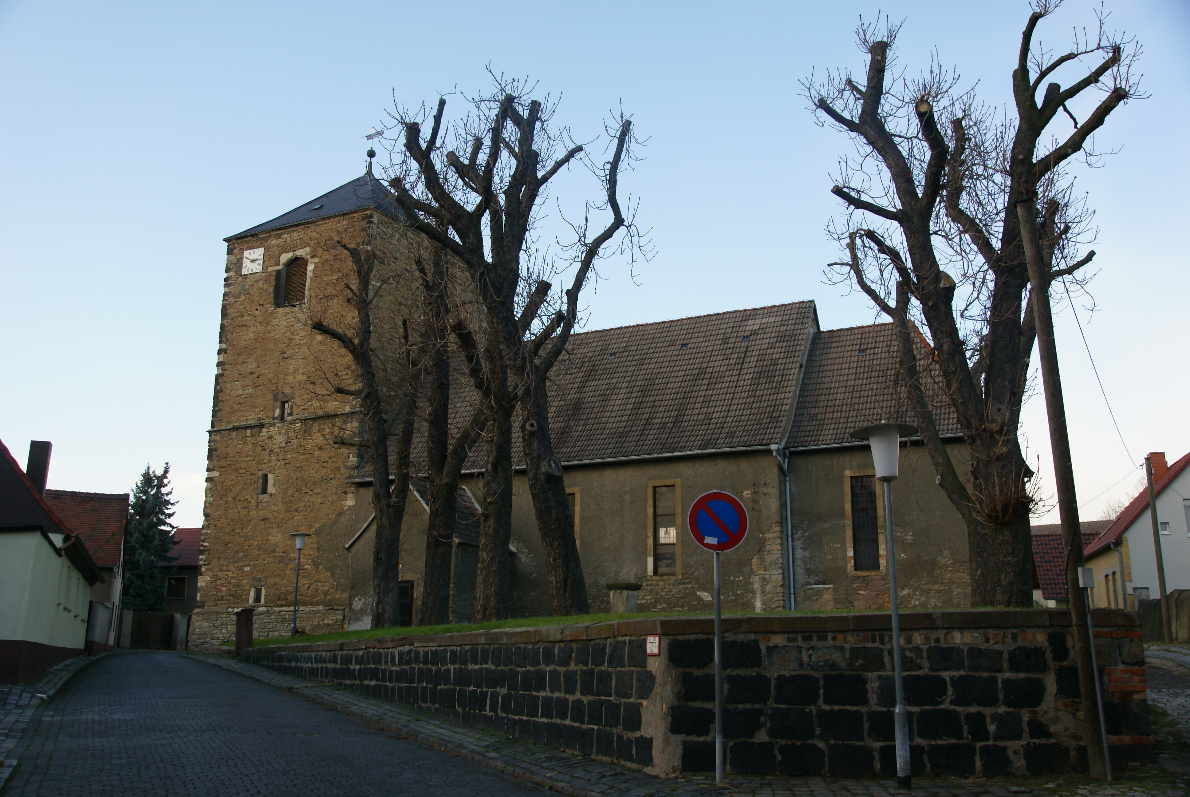 die evangelische Kirche St. Stephanus in Helbra, erbaut im 12. Jahrhundert